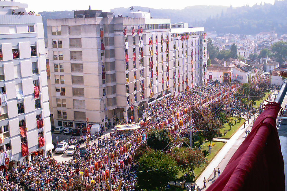 Festa dos Tabuleiros 2003, Cortejo Principal, Alameda Um De Março, Tomar